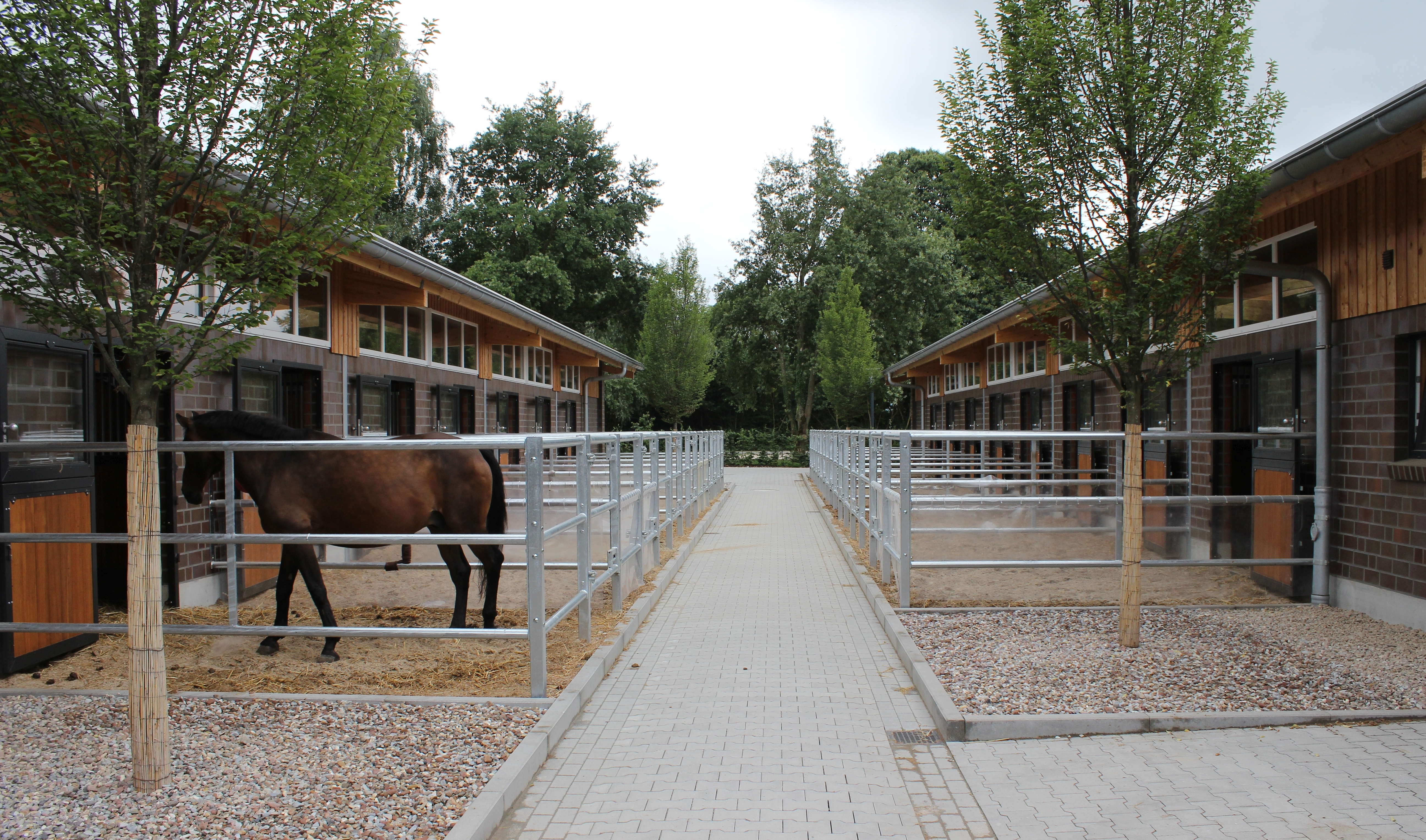 Paddock, Paddockbox paddock fences